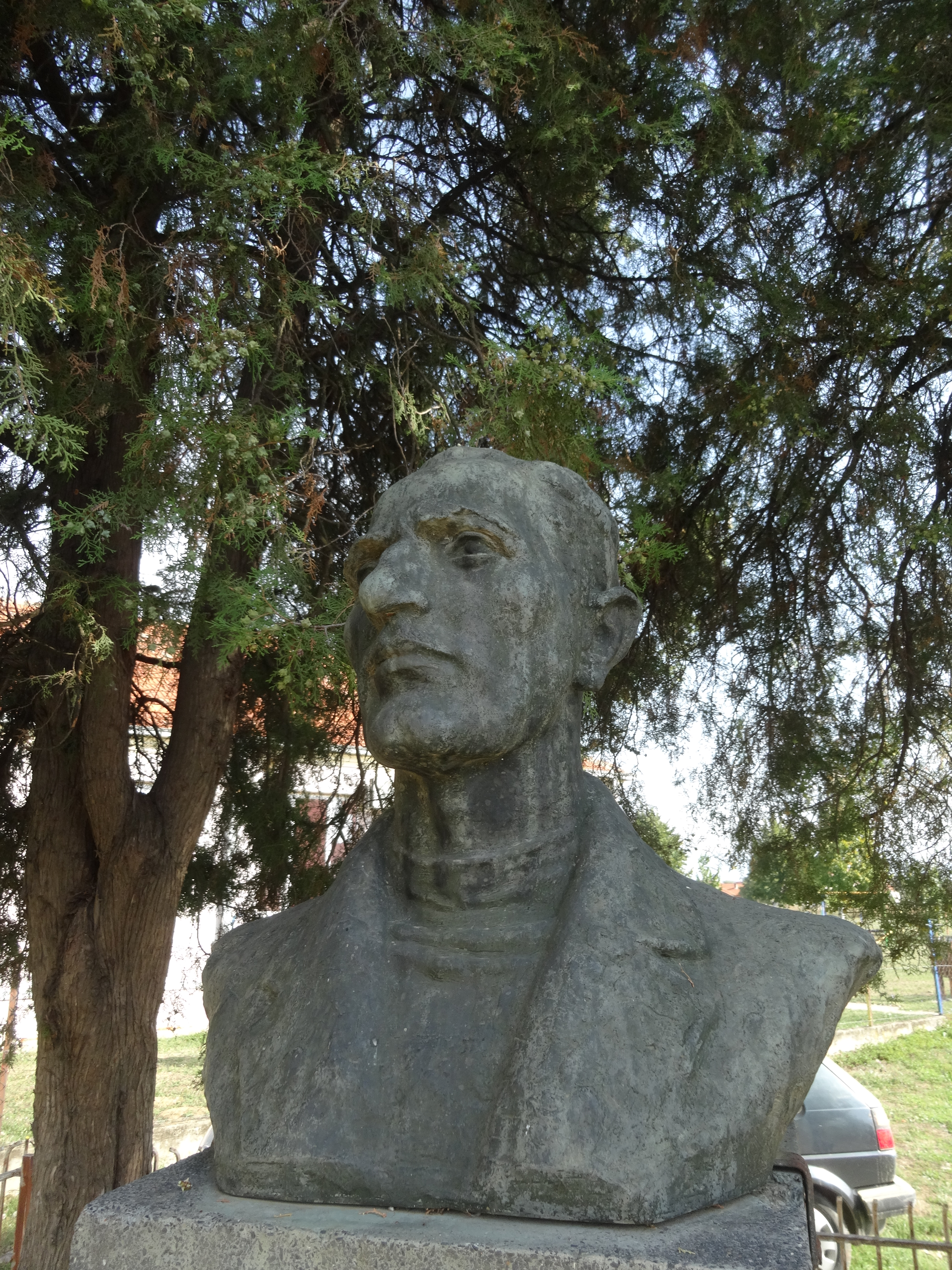 Bratmilovce, Leskovac, Spomenik Tomi Kostiću